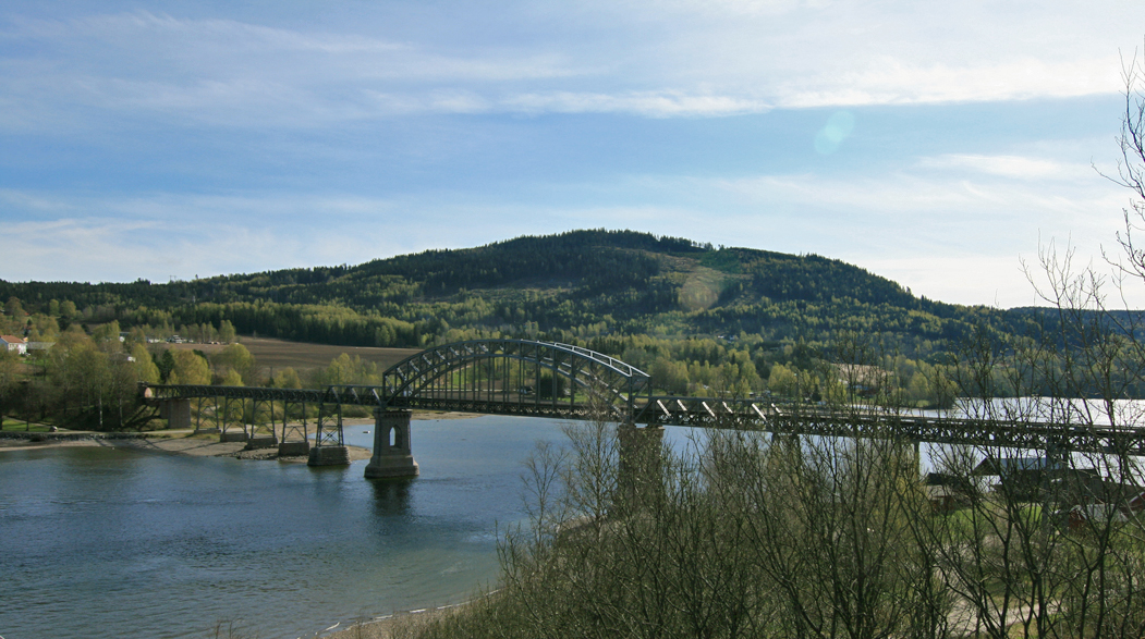 Minnesund jernbanebru, Dovrebanen